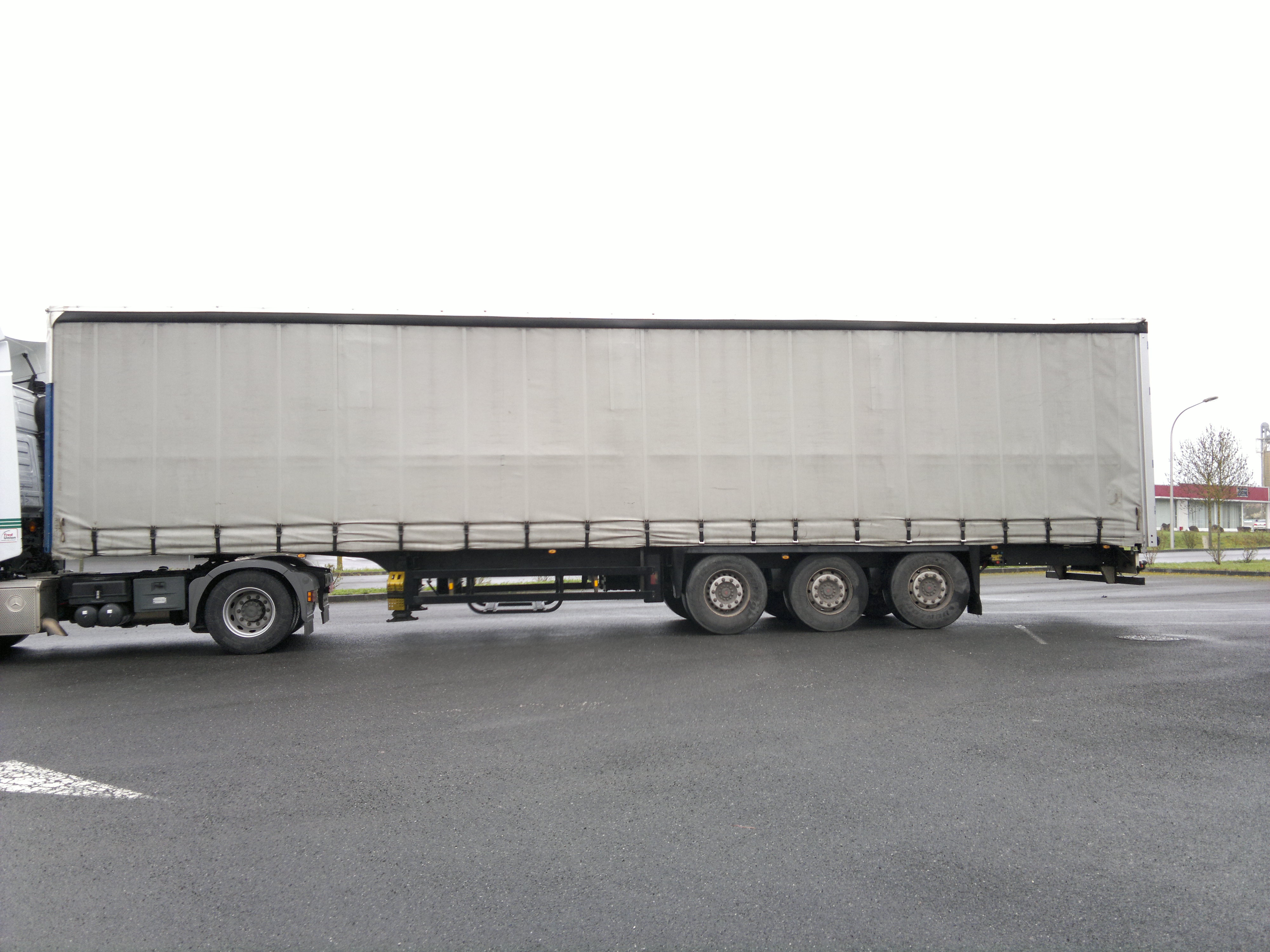 Semi-remorque Tautliner fermée.